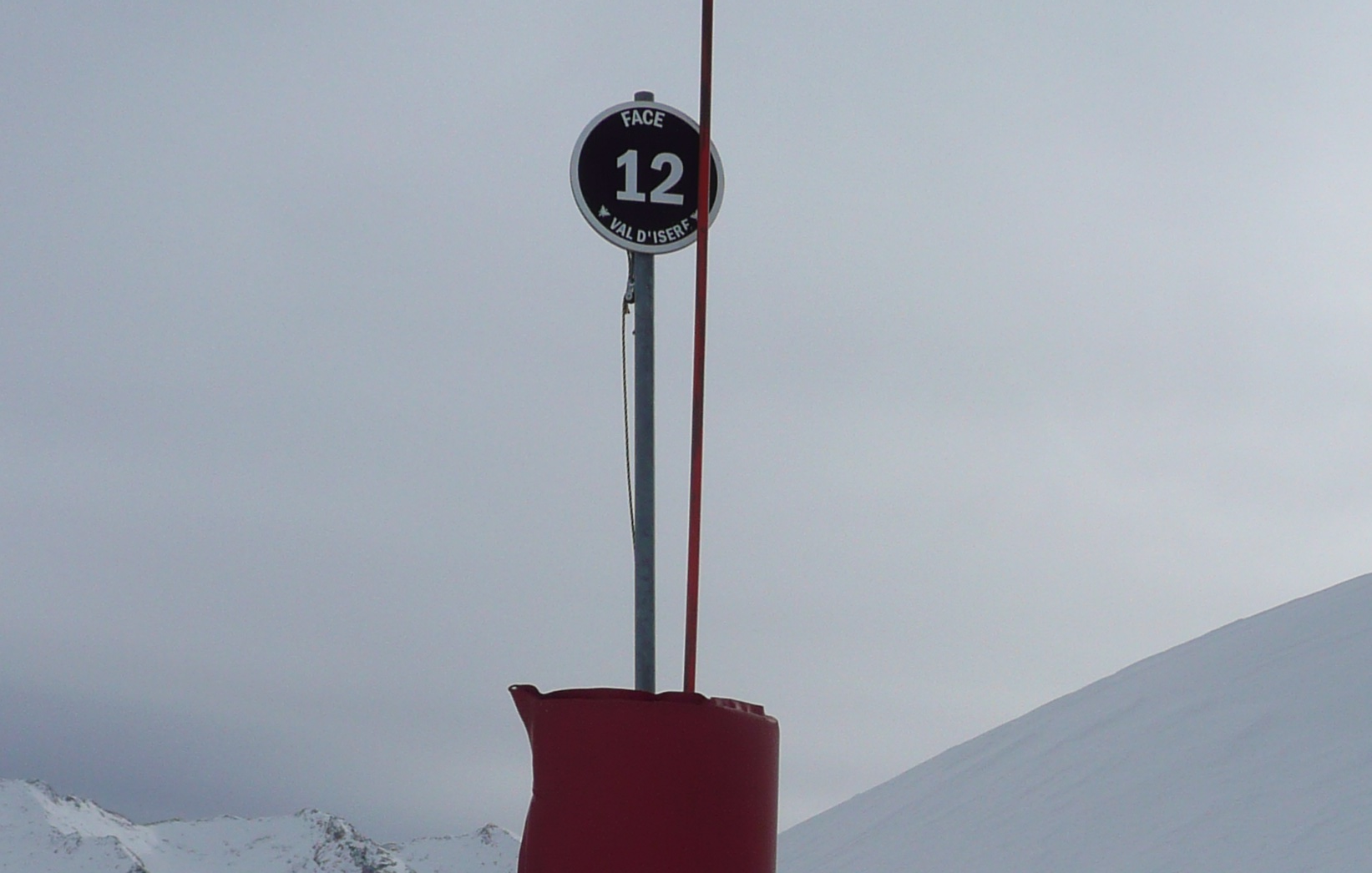 Illustration pour la Face de Bellevarde à Val d'Isère